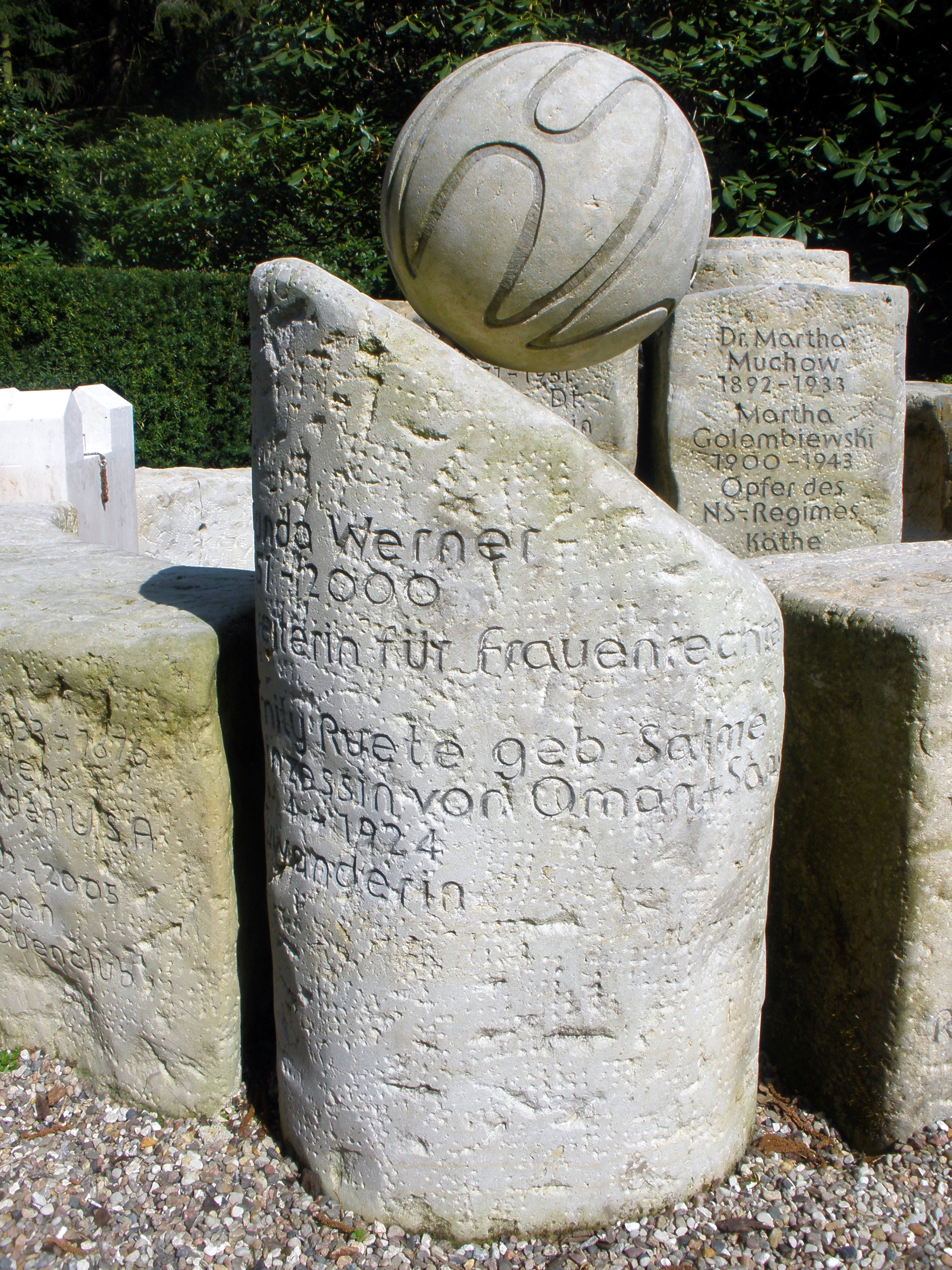 Garten der Frauen Friedhof Ohlsdorf. Namen am Monument: Gunda Werner, Emily Ruete, Martha Muchow, Martha Golembiewski.